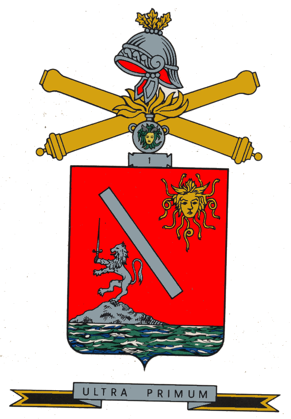 Stemma del 1º Rgt artiglieria (anno 1974)